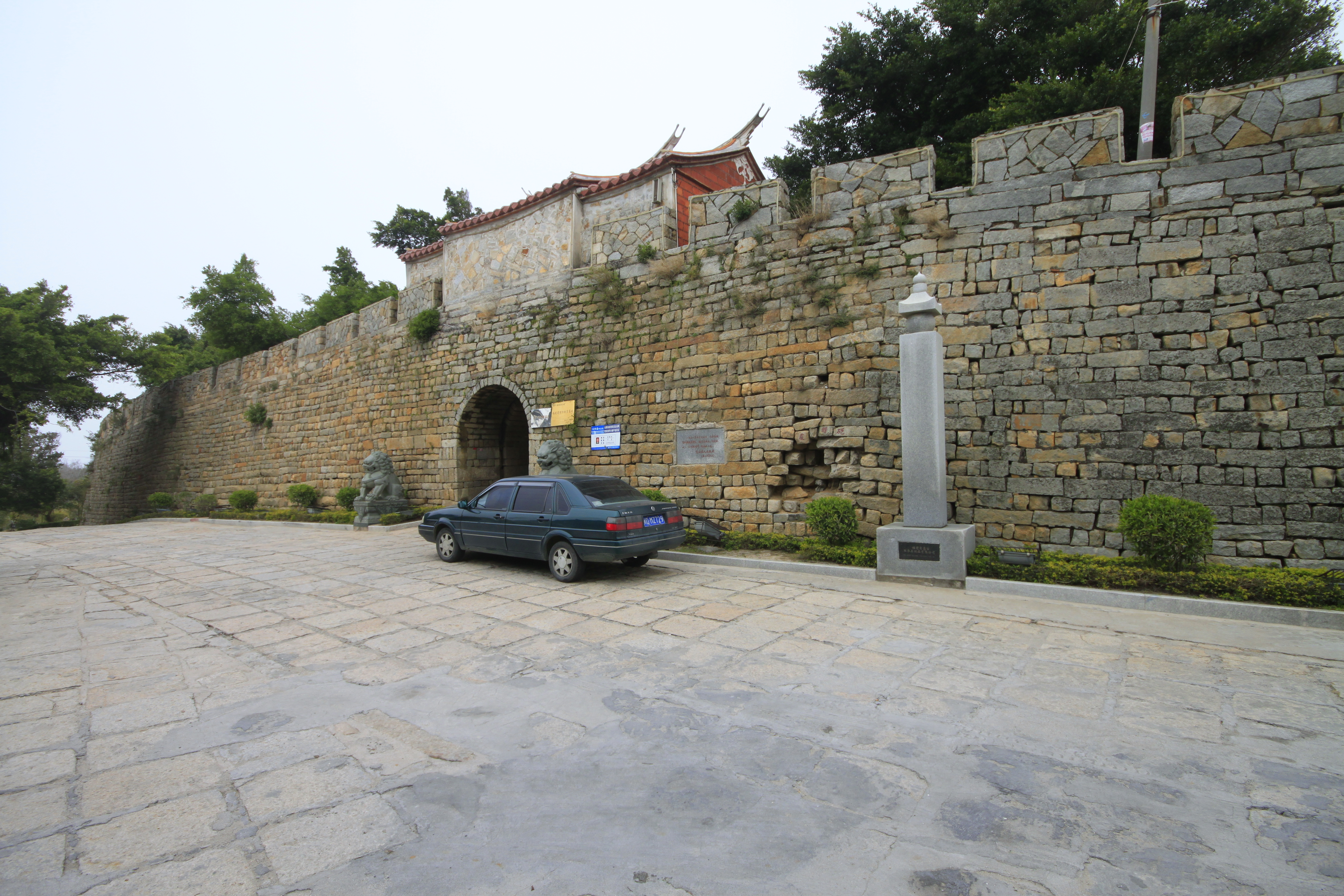 崇武城，位于中国福建省惠安县，是全国重点文物保护单位。